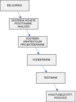 Süsteemiarenduse põhimõtted ja metoodikad